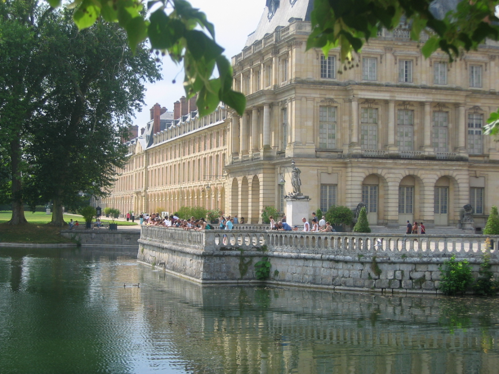 Château de Fontainebleau, Seine-et-Marne, France